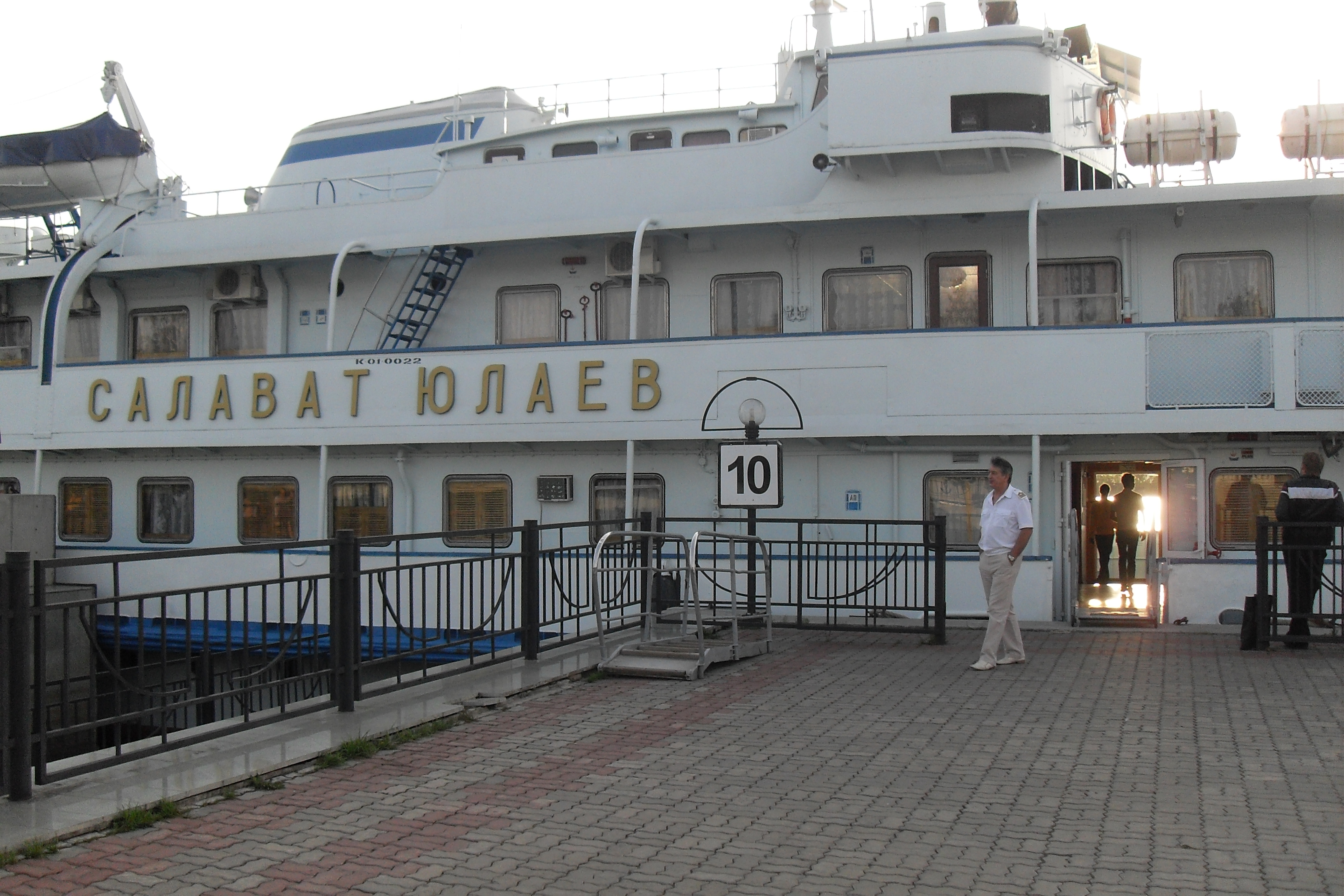 Именем «Салават Юлаев» назван 2х-палубный теплоход